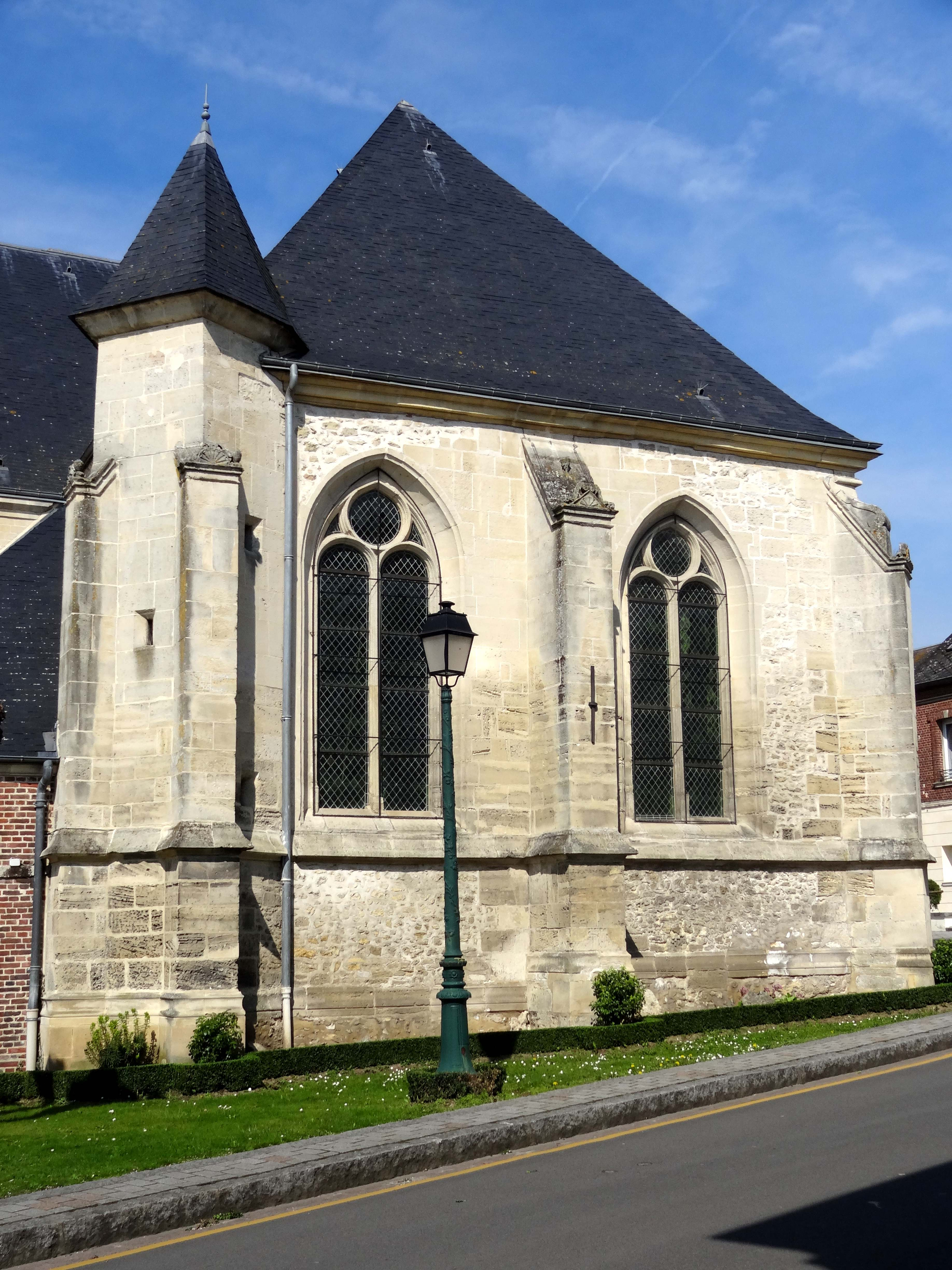 Chapelles au sud du chœur.